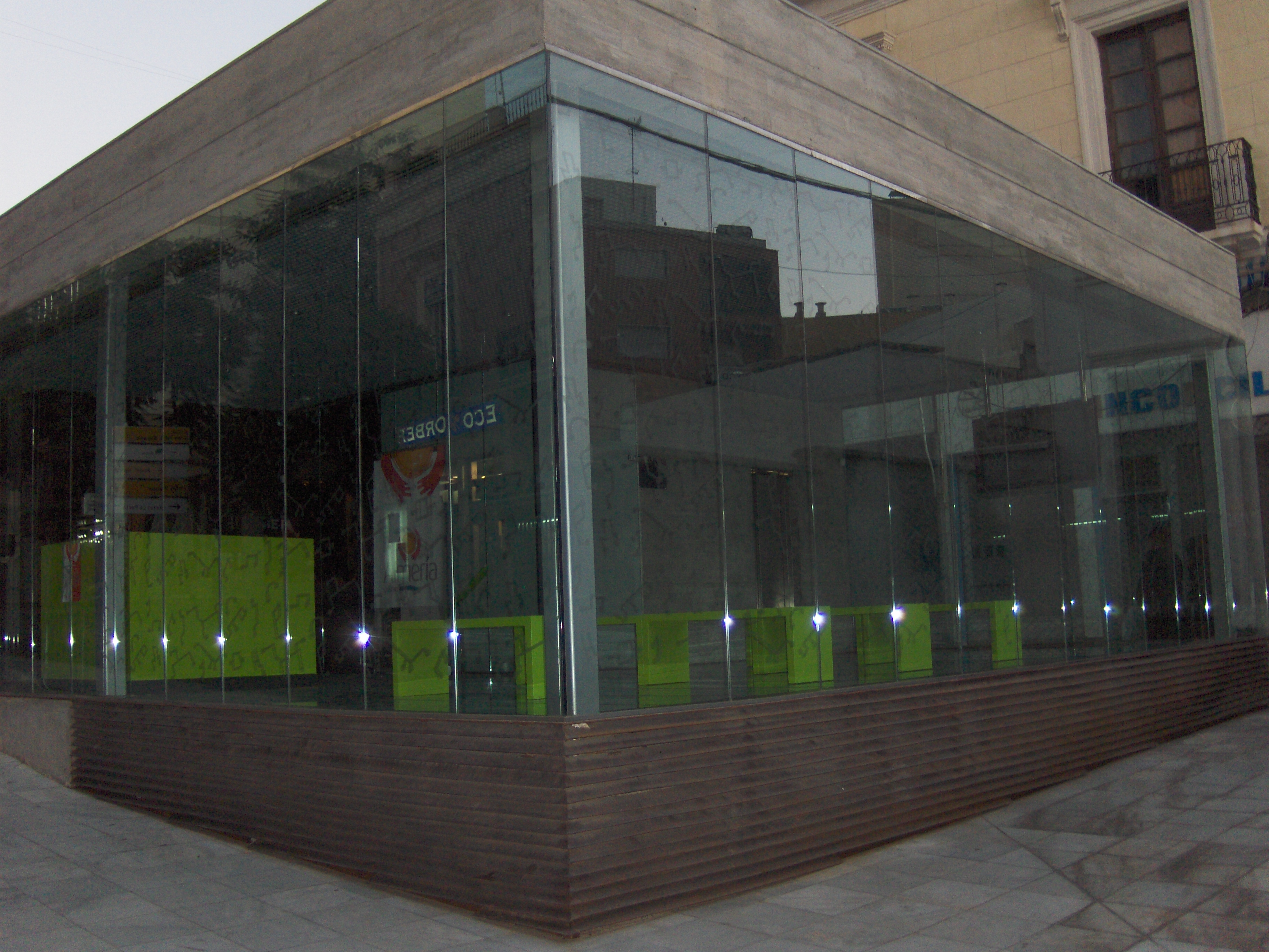 Entrada a los refugios subterráneos de Almería